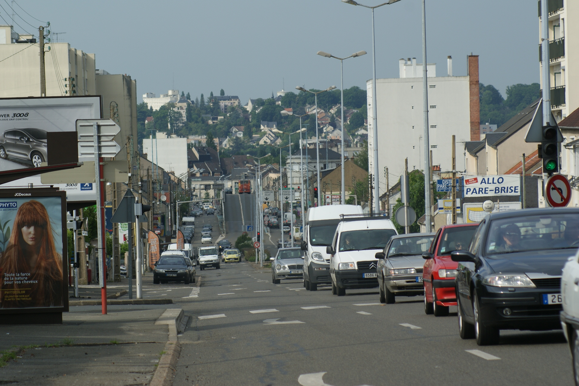 L'Avenue Felix Geneslay au sud du Mans avec au fond, l'autopont datant des années 1970.